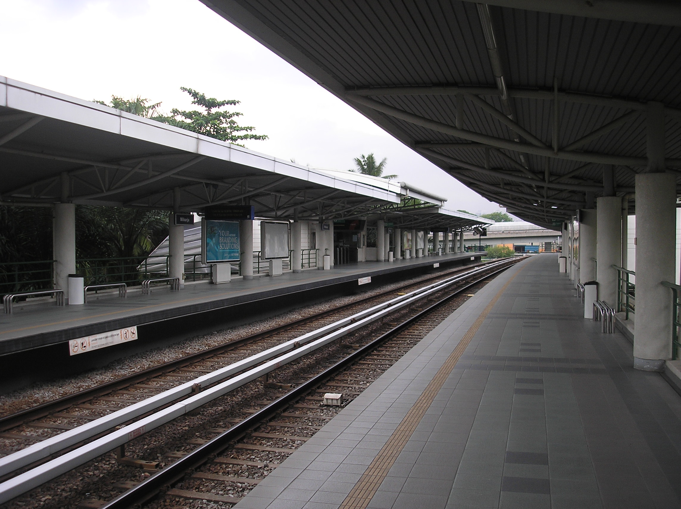 The Miharja LRT station (Ampang Line), Kuala Lumpur, Malaysia.